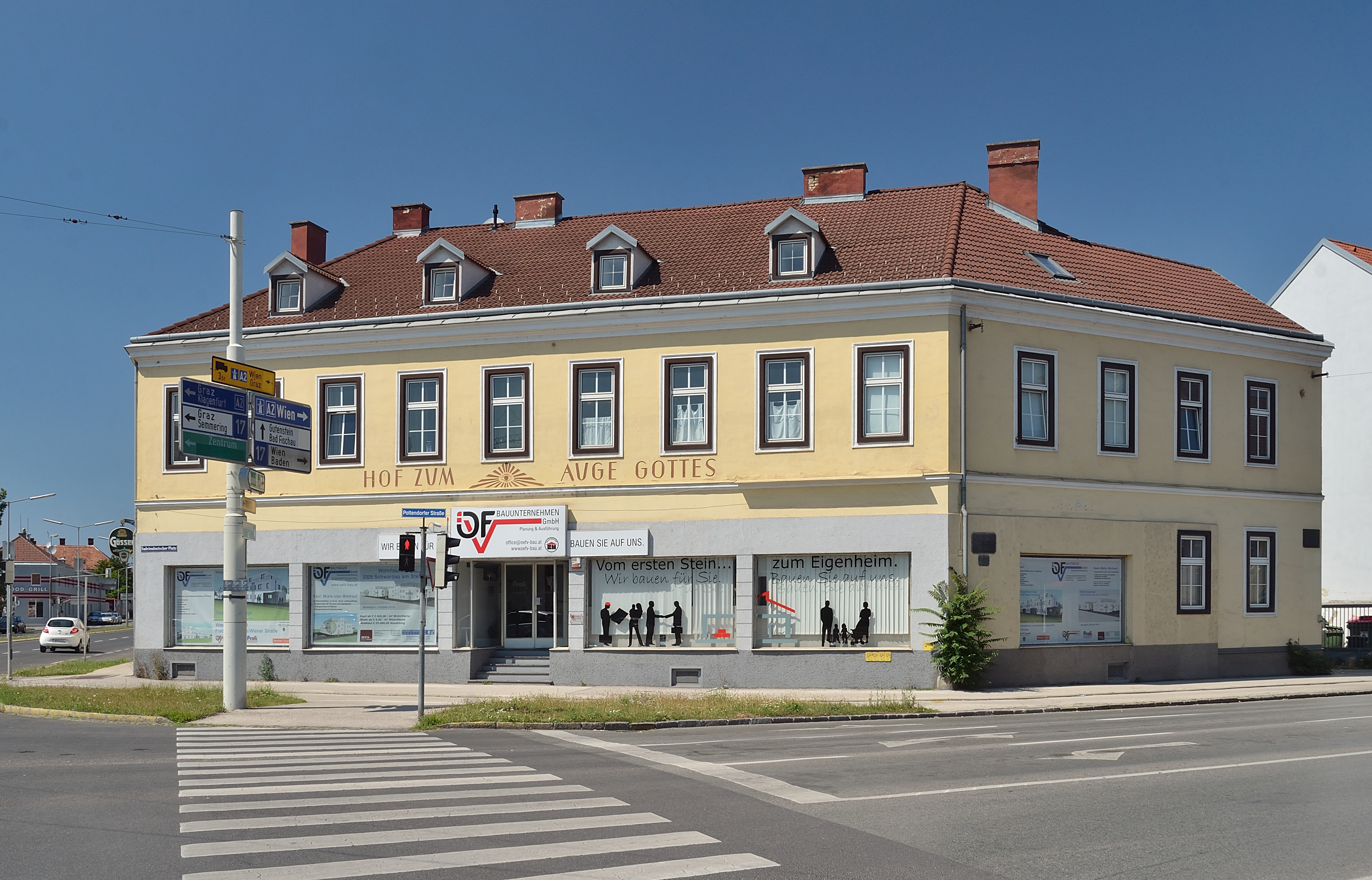 Hof zum Auge Gottes, Wiener Neustadt, Sudentendeutscher Platz, Ecke Wienerstraße / Pottendorfer Straße.